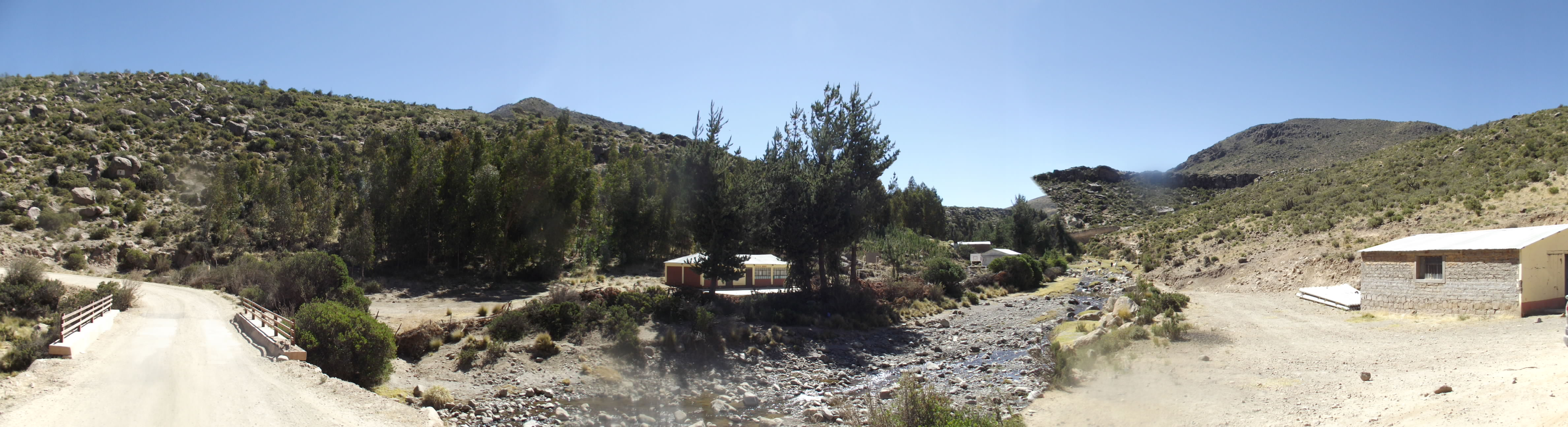 Camino a Andaray en la Comunidad Campesina de Ochuro